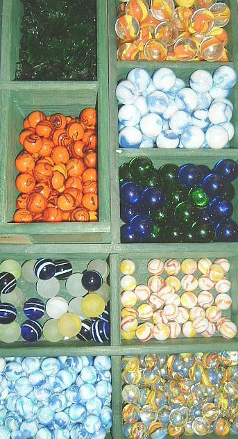 diverse Murmeln; marbles made of glass